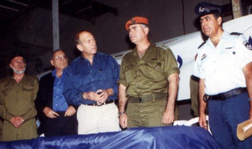 טקס התייחדות לזכר קורבנות האסון באולמי ורסאי. על הבמה מימין לשמאל: מפקד מחוז ירושלים, ניצב מיקי לוי, מפקד פיקוד העורף, גבי אופיר, ראש עיריית ירושלים, אהוד אולמרט, שר התיירות, רחבעם זאבי והרב הצבאי הראשי, ישראל וייס.